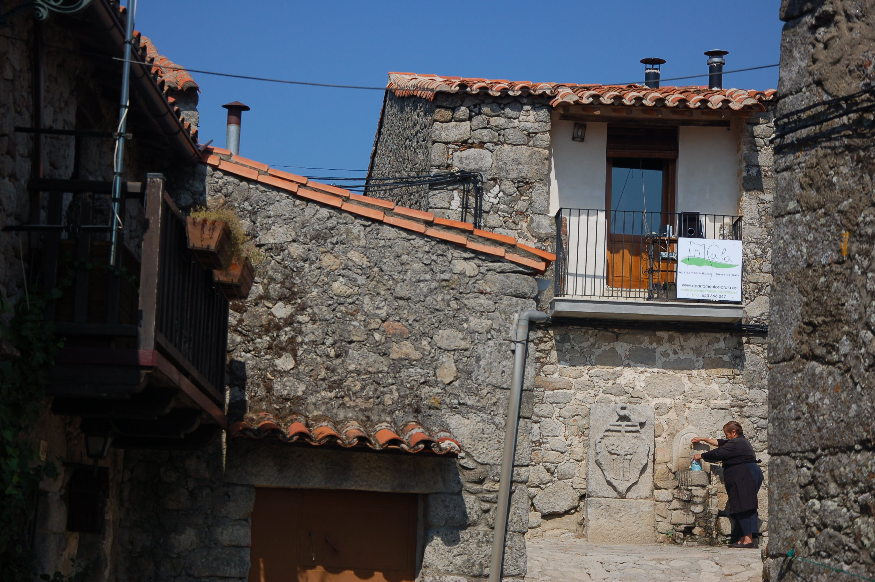 al fondo los apartamentos rurales A Fala